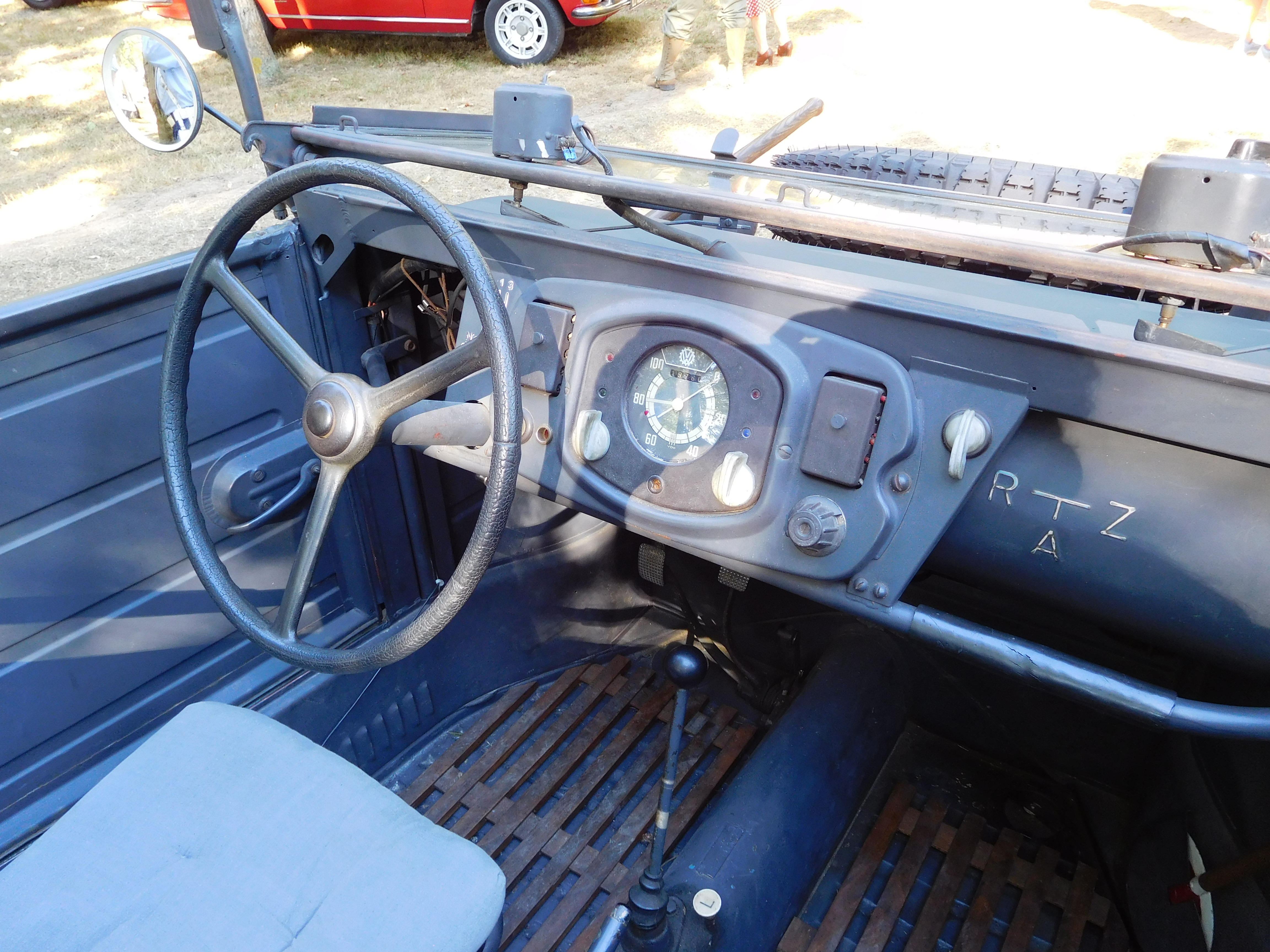 Volkswagen Kübelwagen (Type 82) : intérieur. Au parc Voulgre, Mussidan (Dordogne, France).